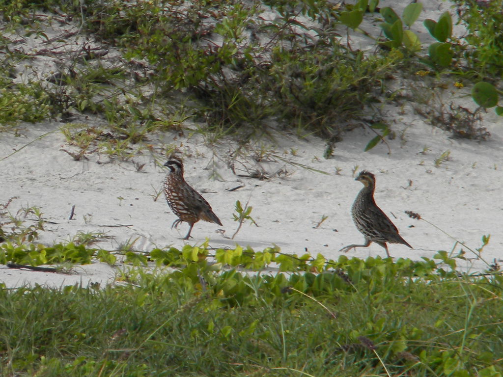 Colinus nigrogularis, Chicxulub, Yucatan, Mexico.